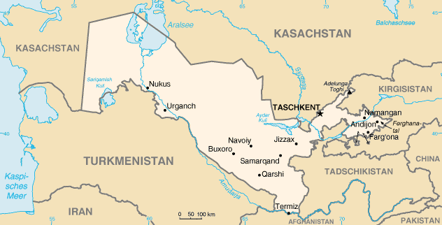 Karte von Usbekistan